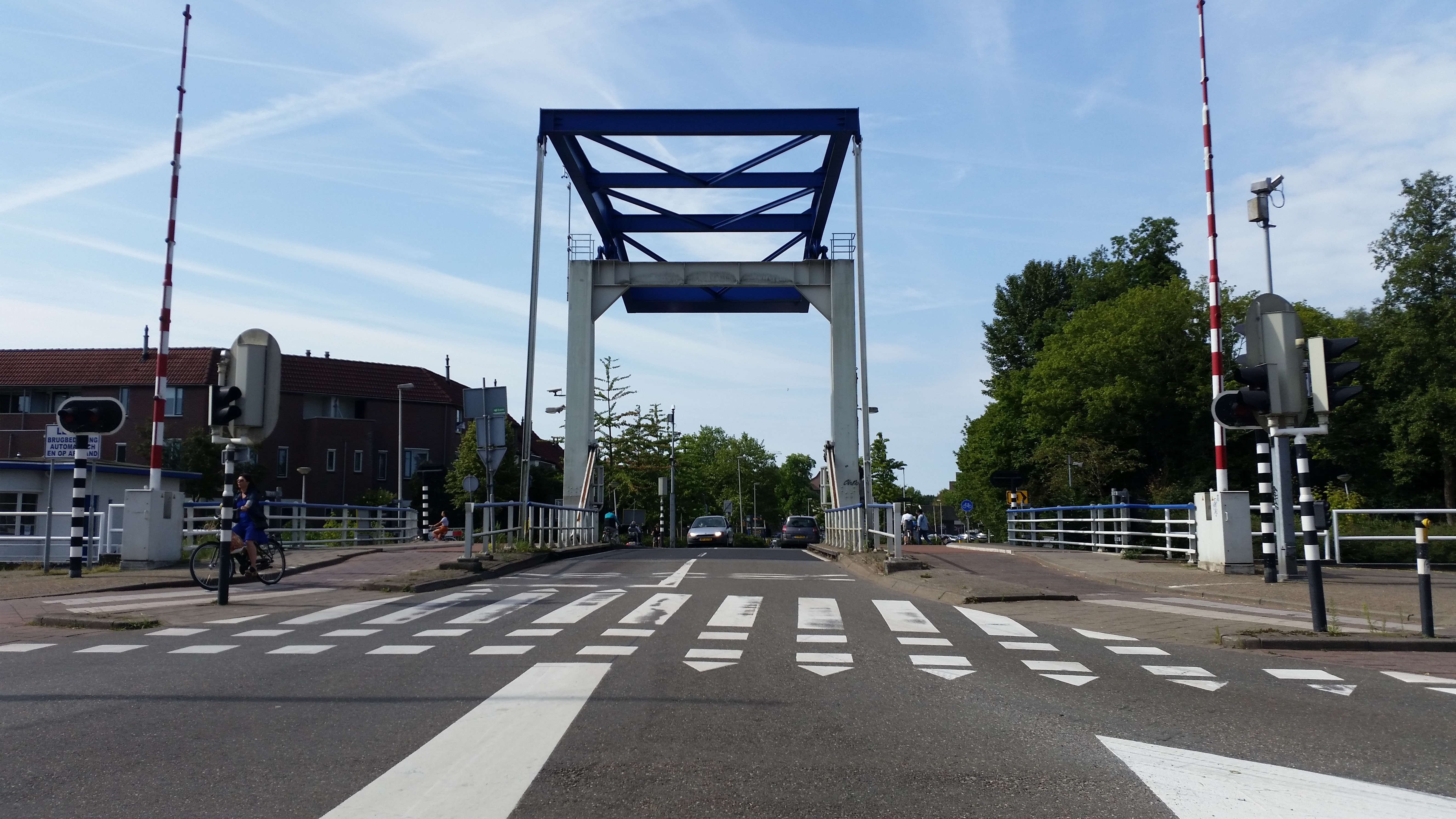 Diemerbrug, Diemen, overzichtsfoto